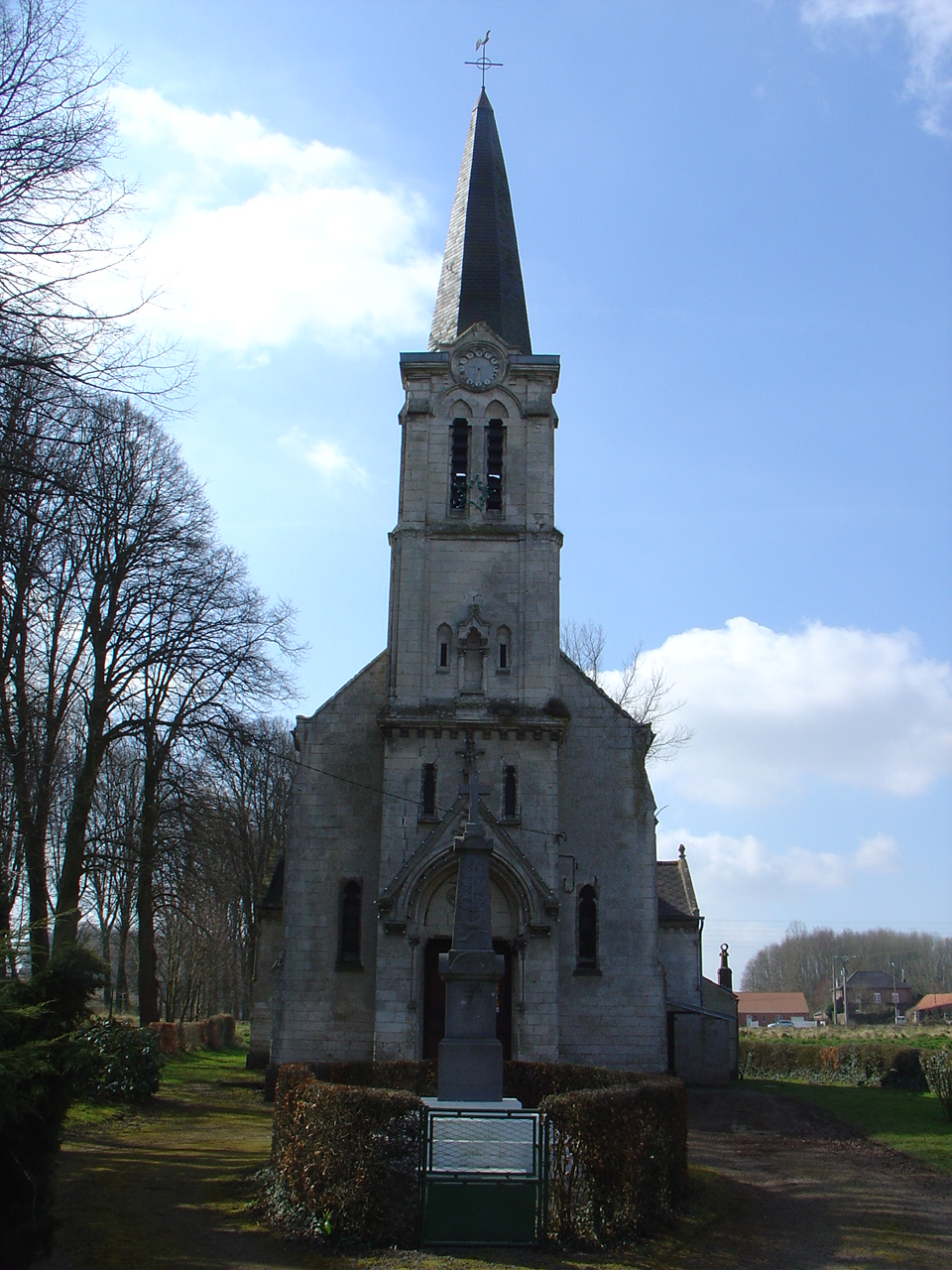 Église de Monchy-Cayeux